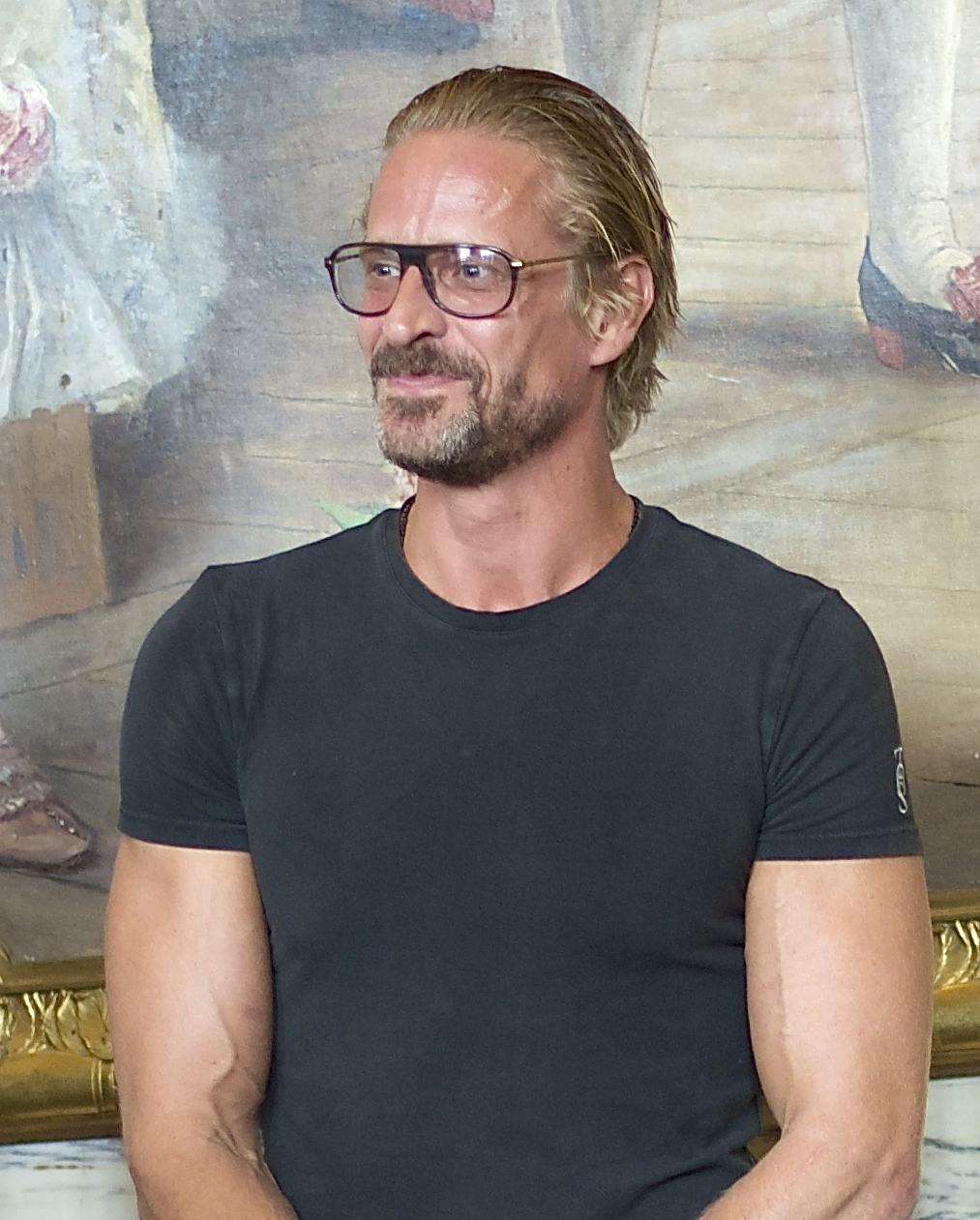 Jonas Malmsjö under Dramatens höstsamling den 19 augusti 2014.